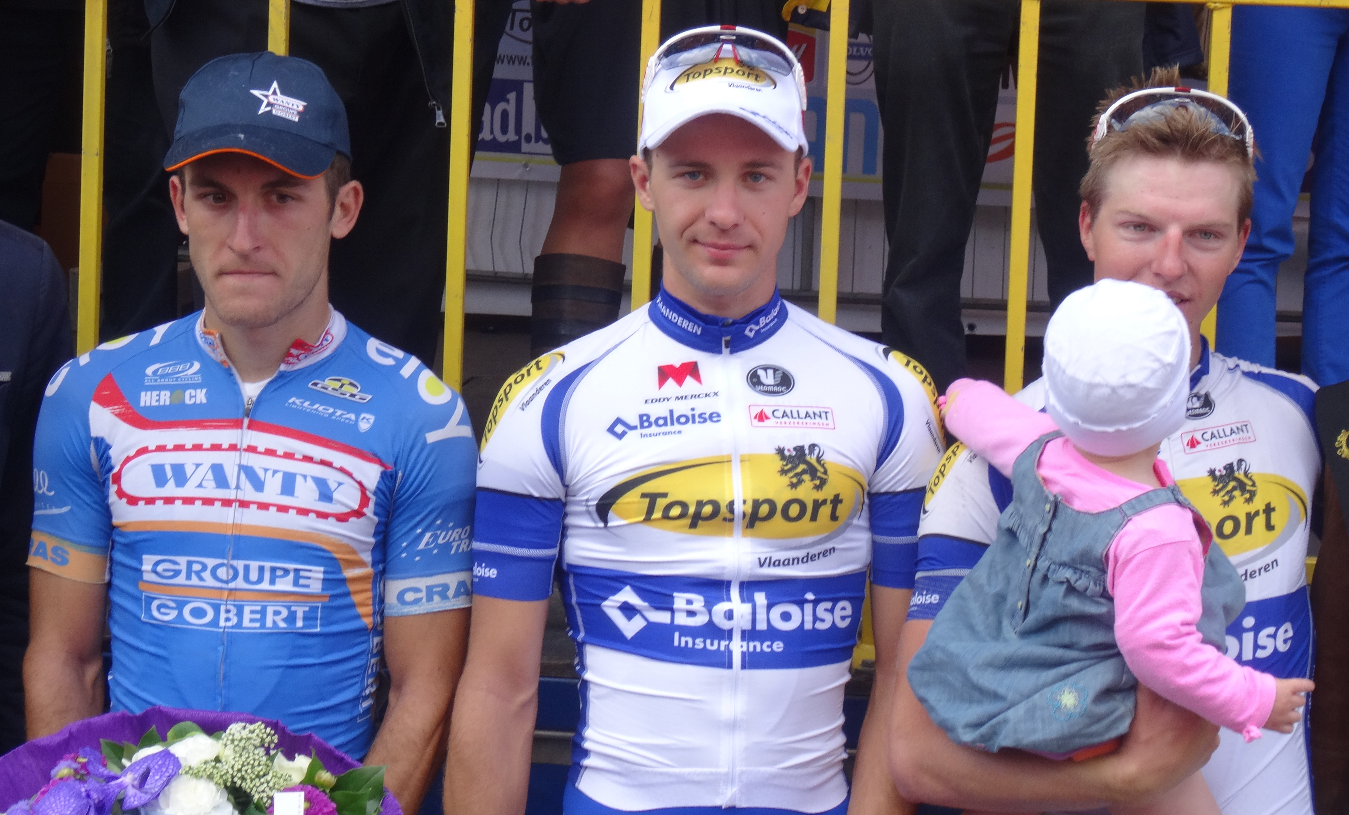 Reportage photographique réalisé le mardi 19 août à l'occasion du départ et de l'arrivée du Grand Prix de la ville de Zottegem 2014 à Zottegem, Belgique.